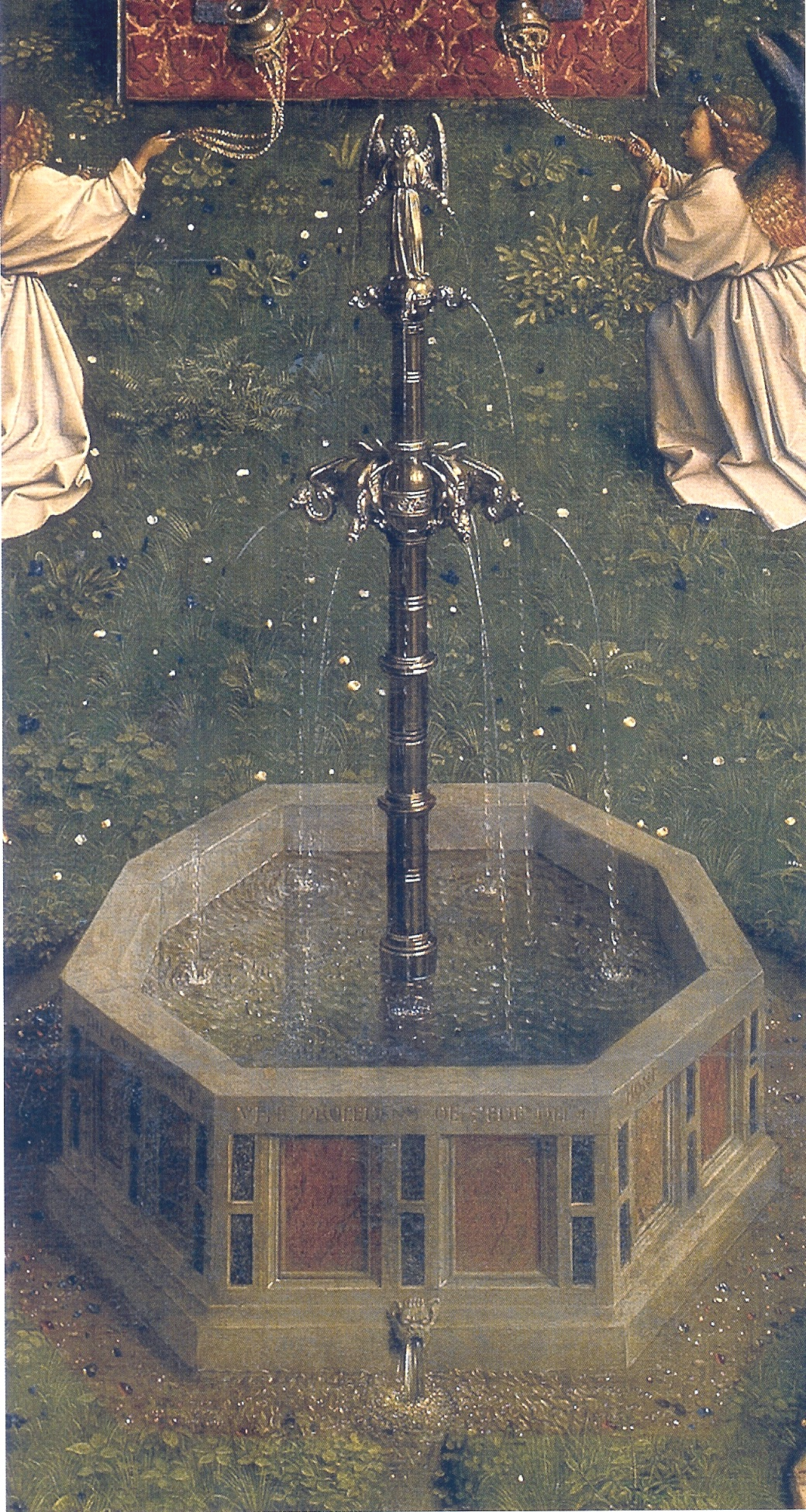 detail: fountain